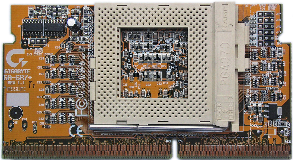 Beschreibung: Slotadapter Sockel 370 auf Slot 1 Fotograf: Darkone, 26. Juni 2005